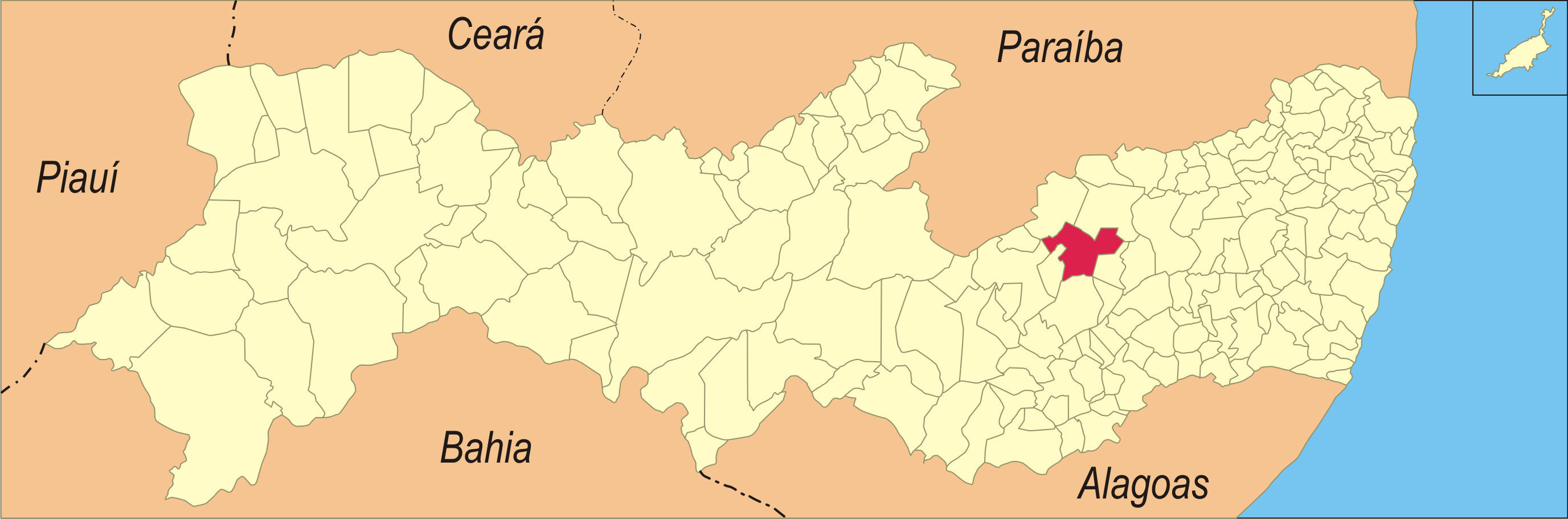 Localização da cidade no estado de Pernambuco